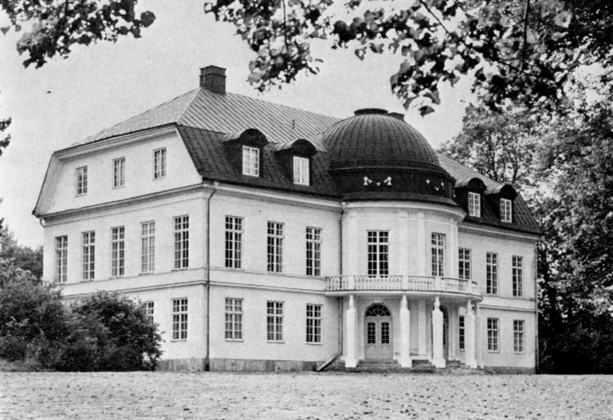 Broby gård, huvudbyggnad